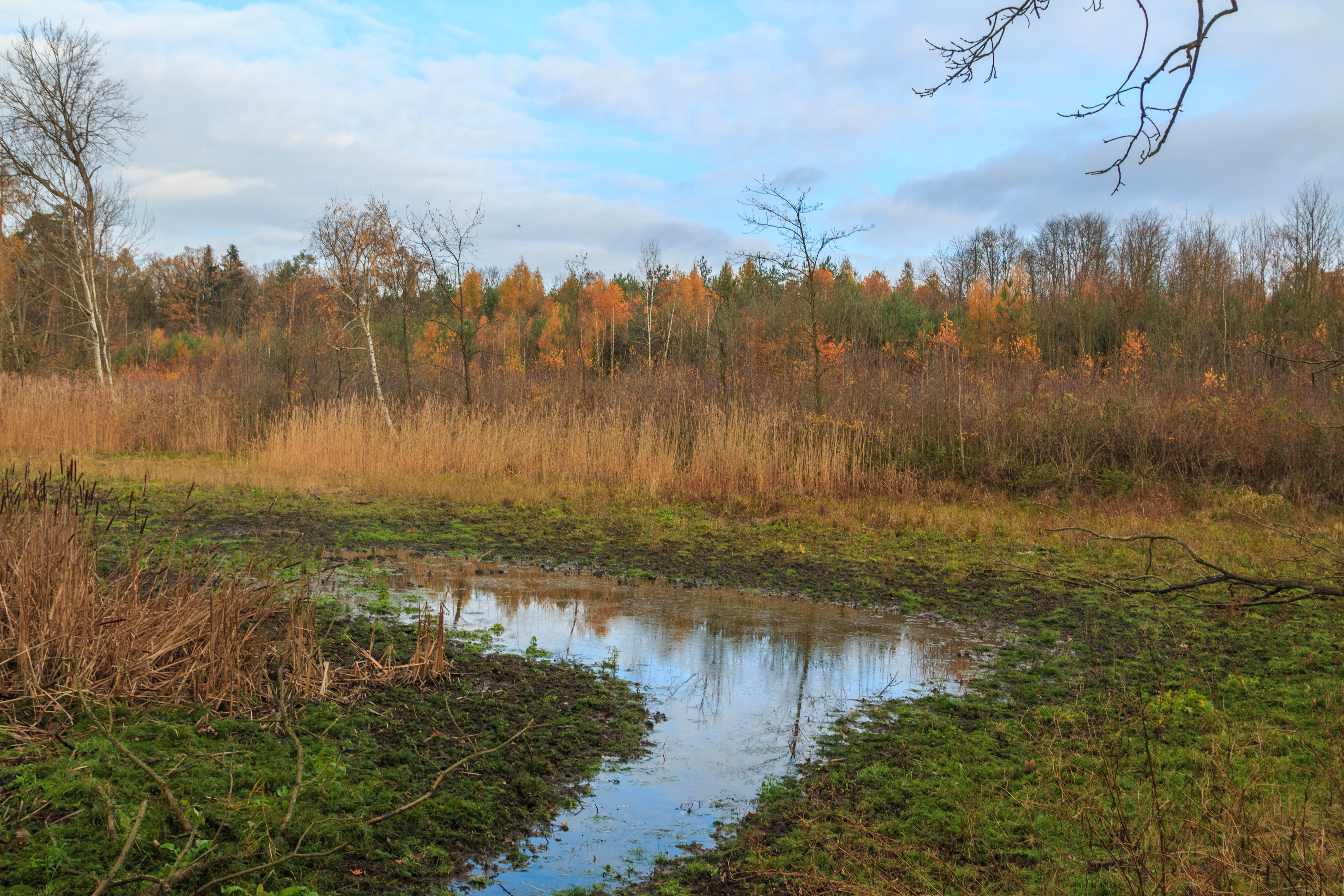 rybník Dolní Truhličky Project: Vodstvo.